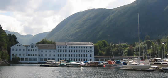 Eidsvåg Fabrikker